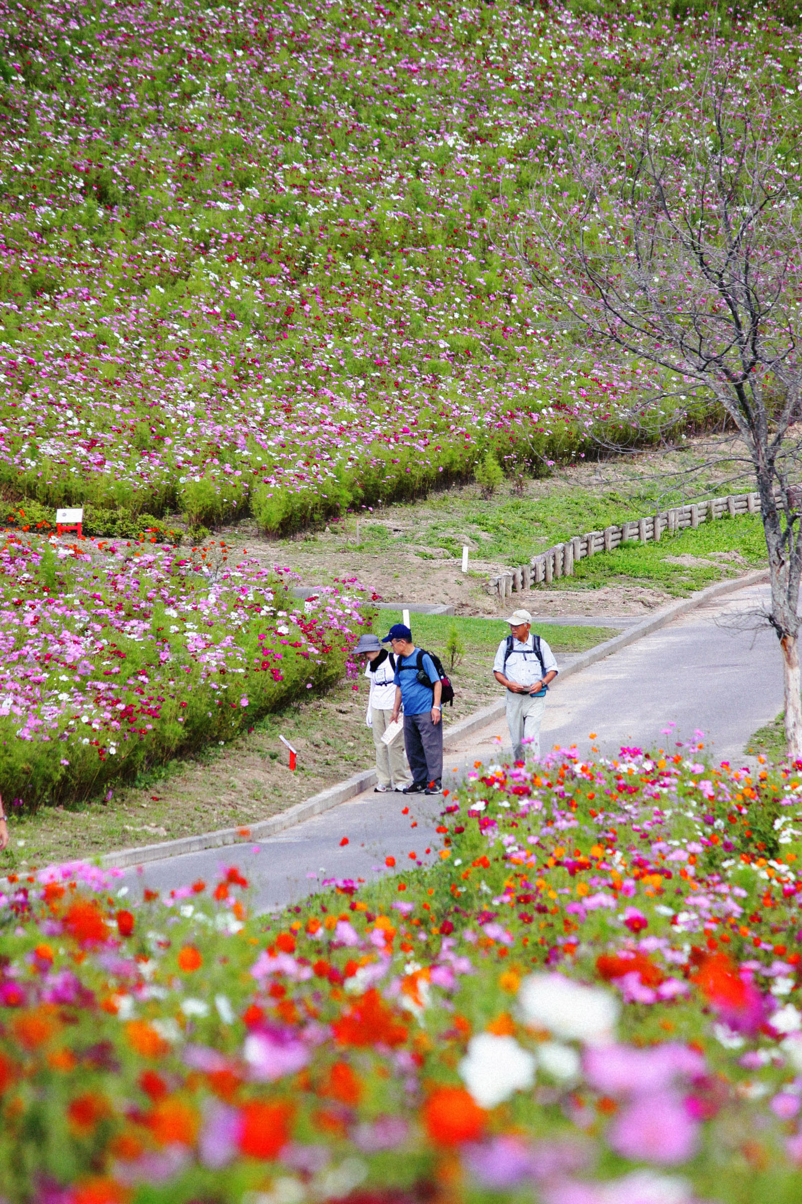 太陽の丘えんがる公園コスモス園